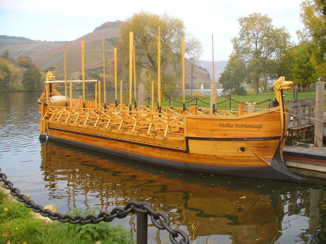 Stella Noviomagi